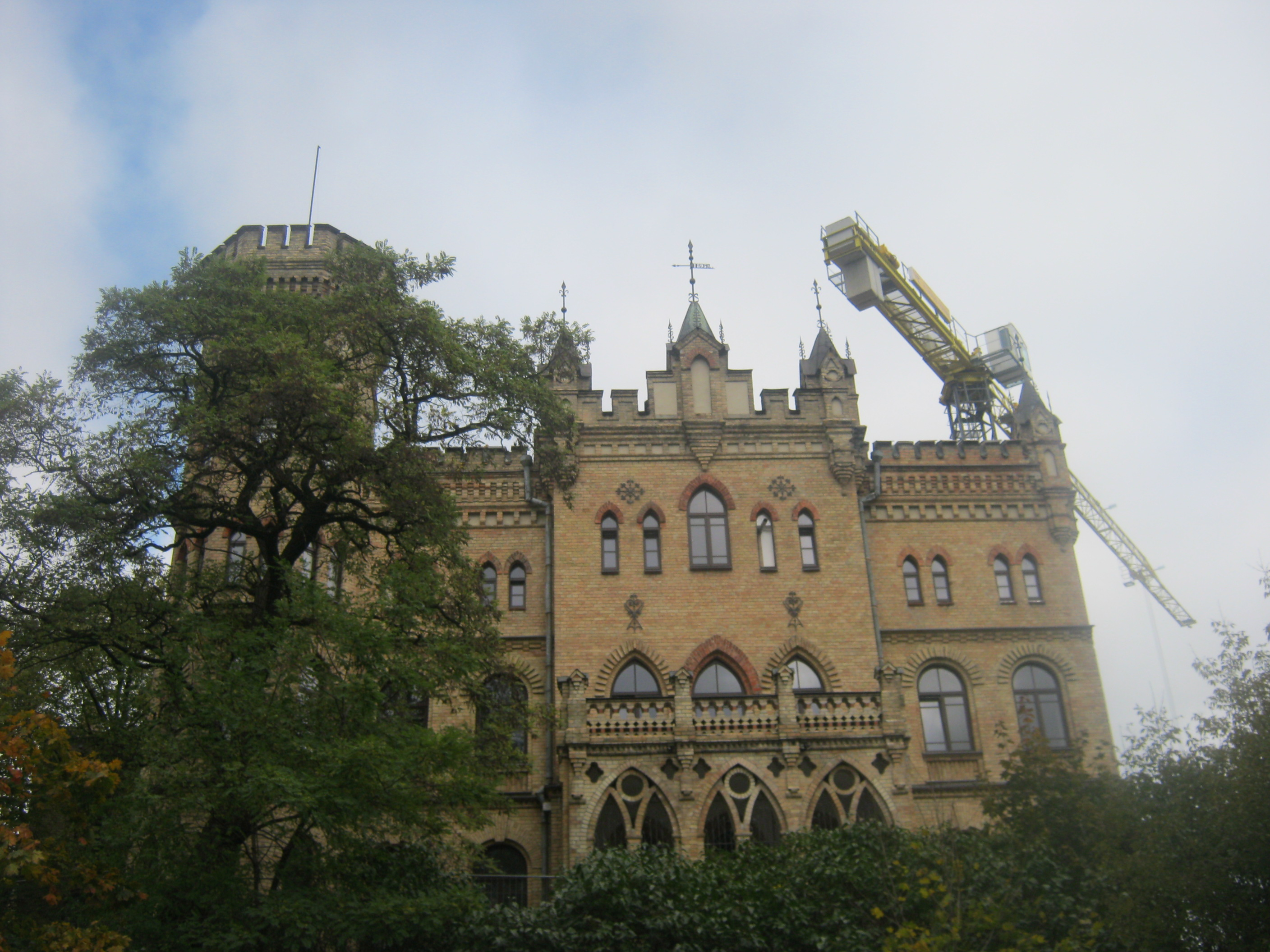 Vilnius